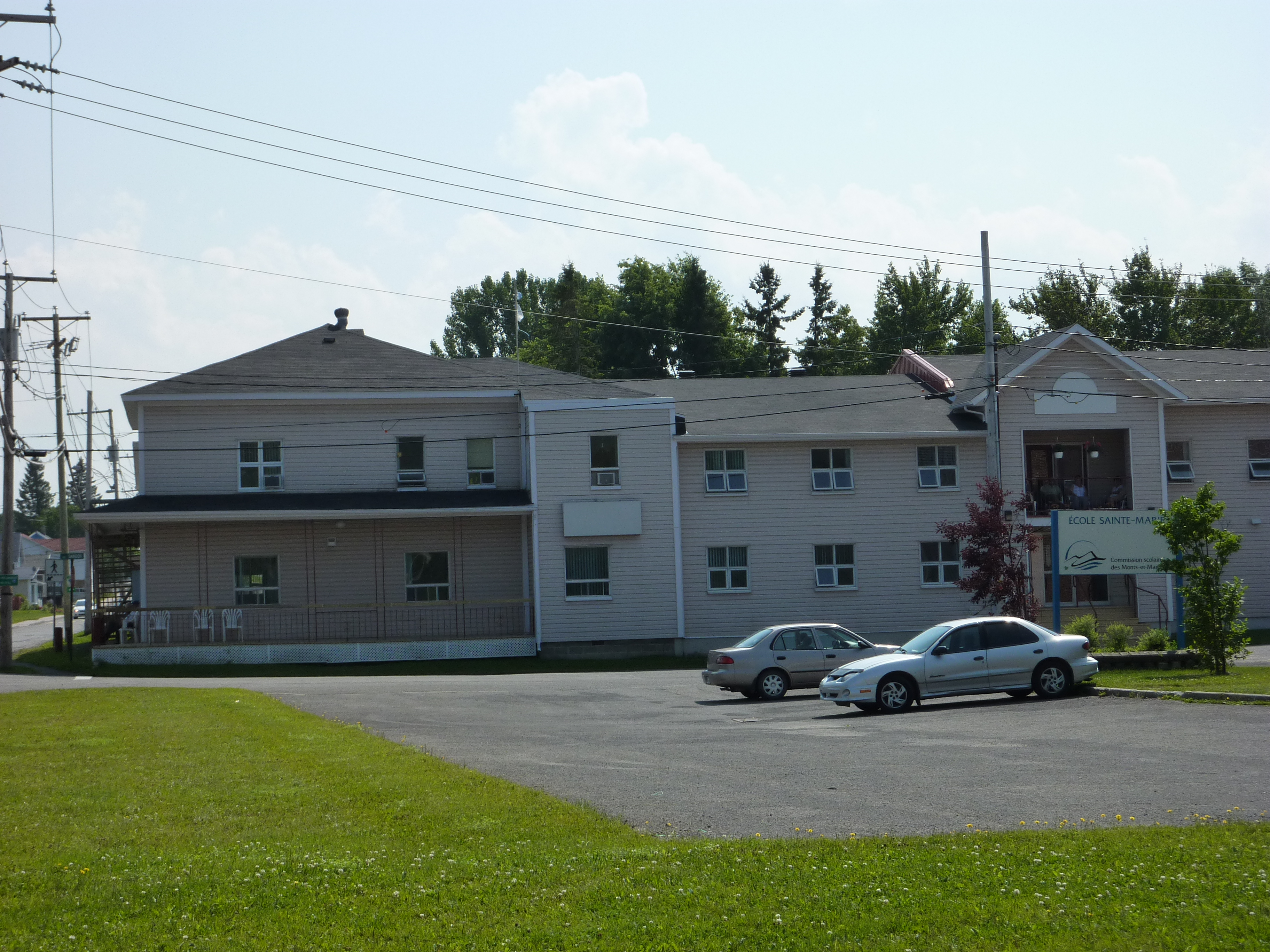 Foyer Sainte-Marie de Sayabec